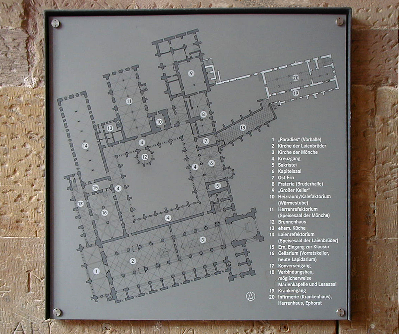 Kloster Maulbronn, Tatsächliche Lage des Klosters ((Hinweistafel im Paradies)